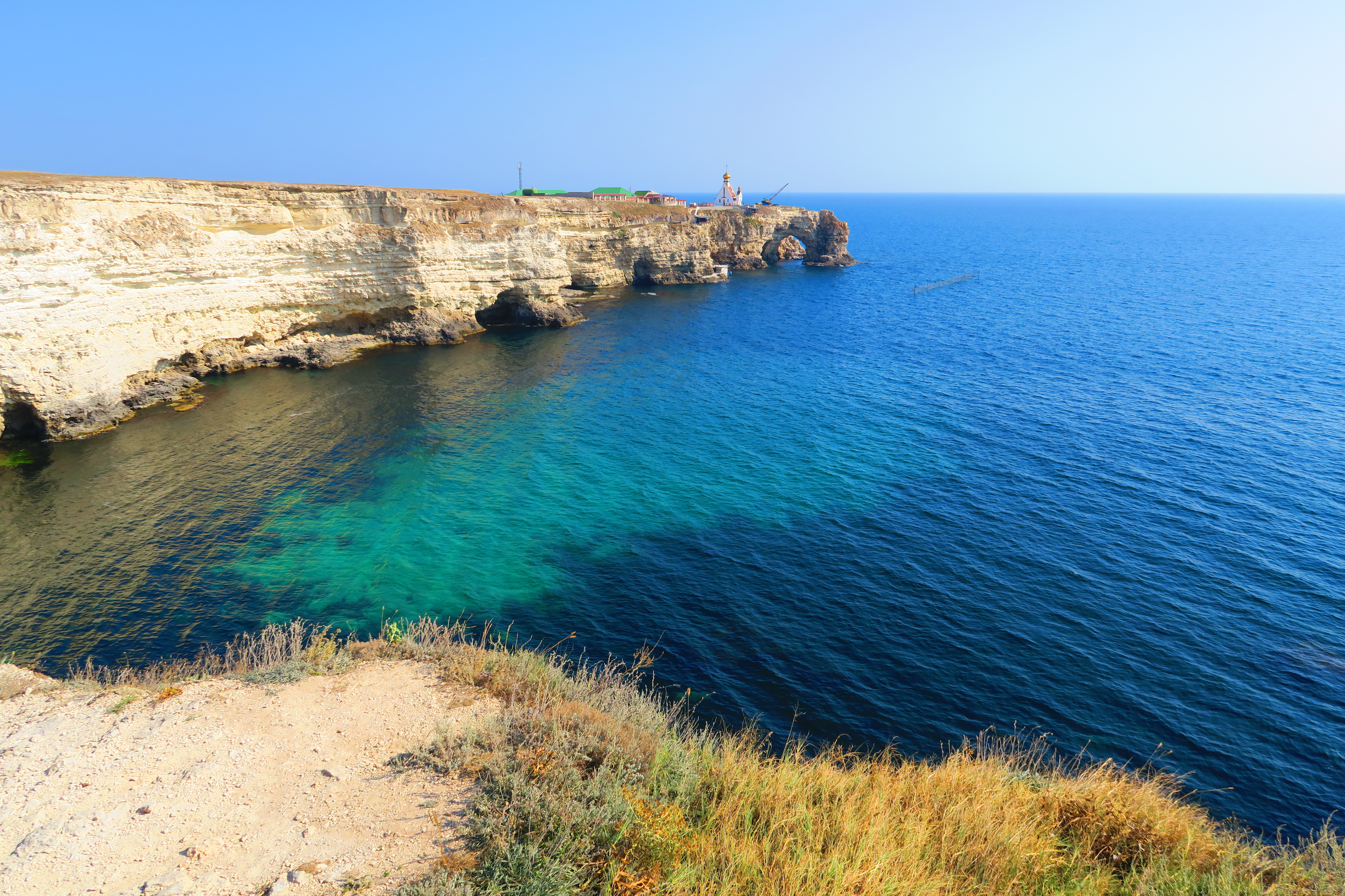 Тарханкут 2015